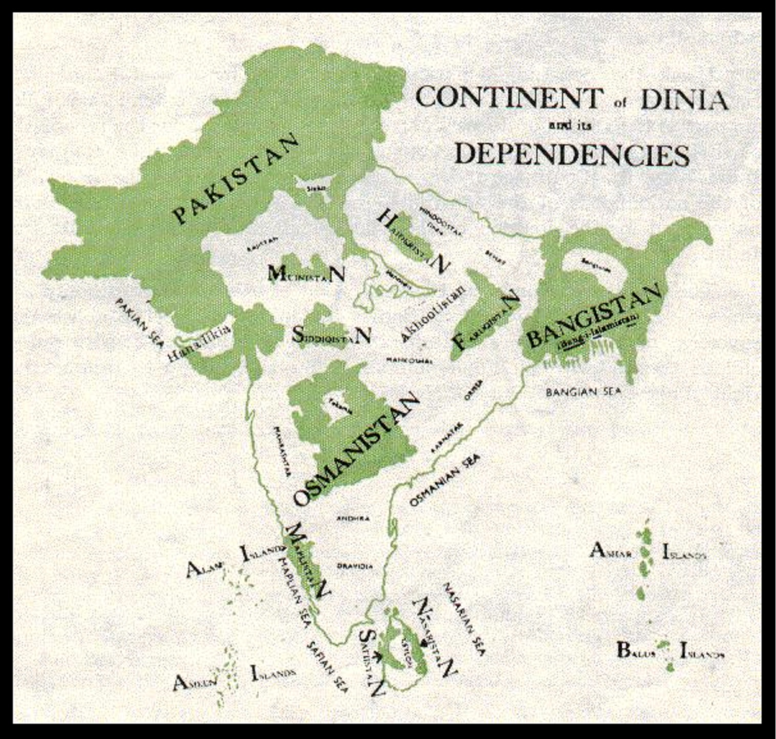 نقشہ چوہدری رحمت علی